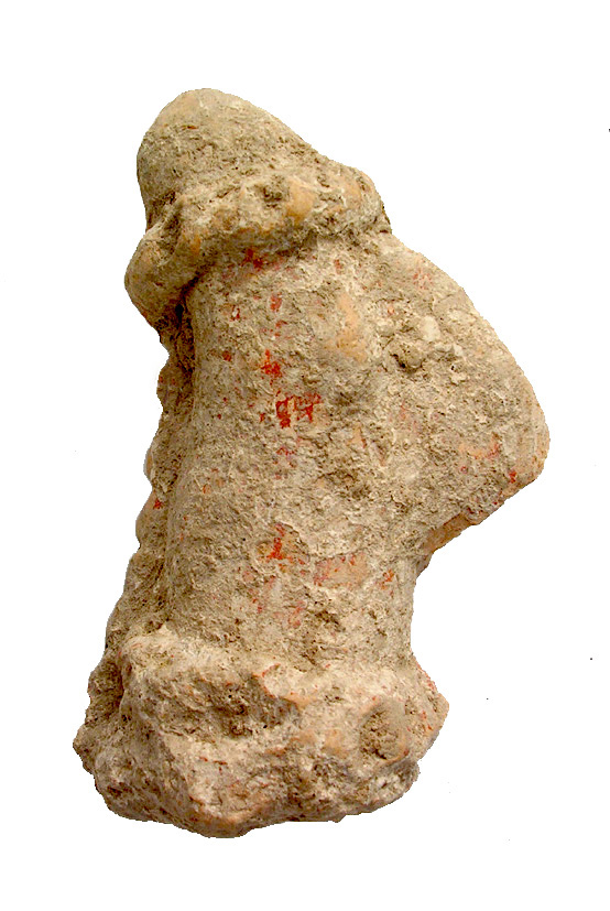 חורבת עוצה - ראש צלמית של אישה משכבה 20 התקופה הנאוליתית שטח D